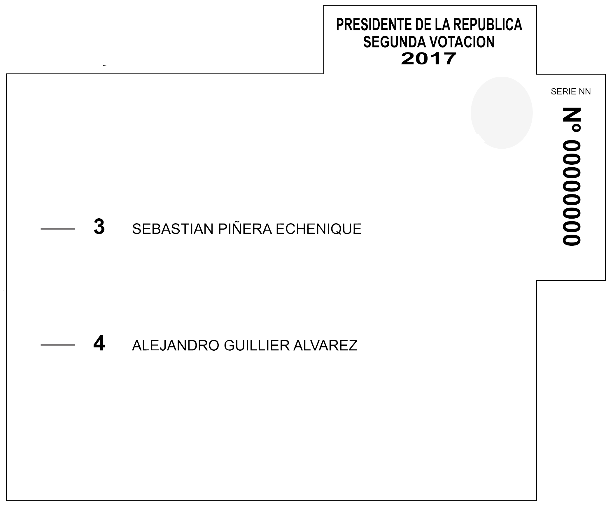 Reproducción de la cédula de votación utilizada en la segunda vuelta de la elección presidencial de Chile de 2013.